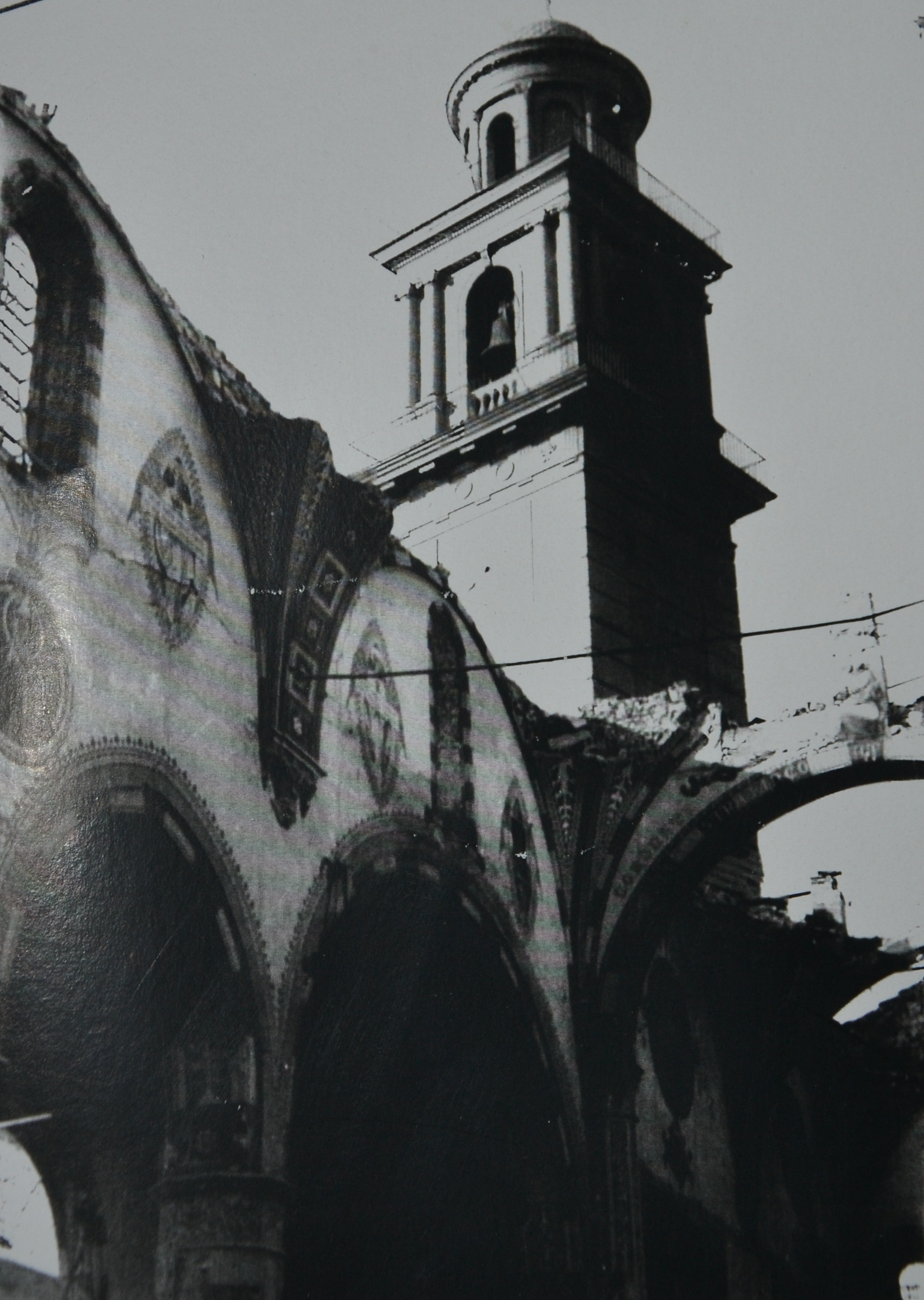 Santuario di Nostra Signora Incoronata (Coronata, Genova)